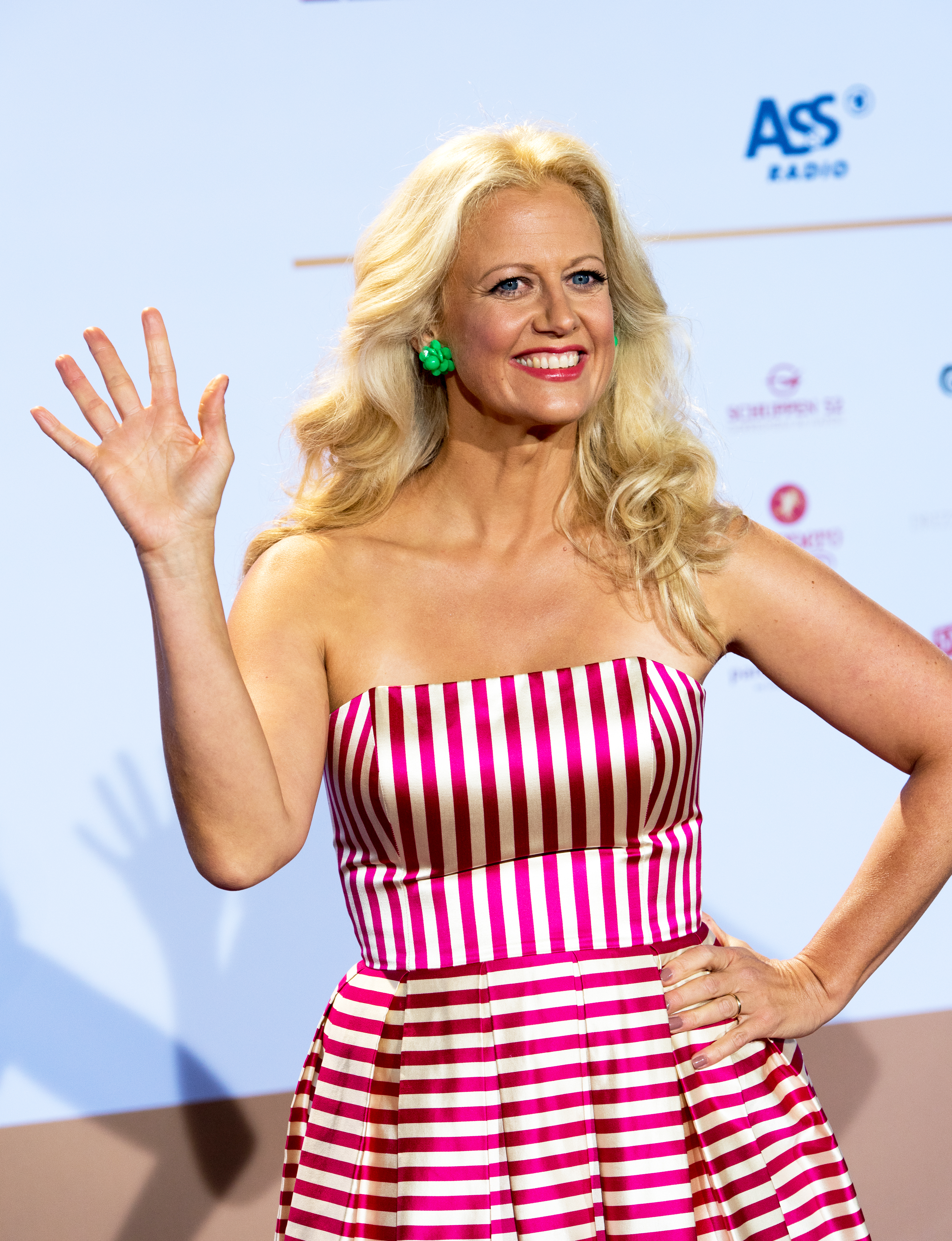 Barbara Schöneberger beim Deutschen Radiopreis 2016 im Schuppen 62 in Hamburg